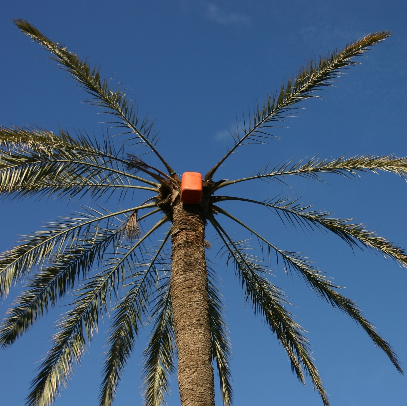 Photographie personnelle prise en 2004 représentant un palmier de l'oasis de Gabès (Tunisie) dont on récolte la sève liquide extraite de la partie supérieure du tronc appelé legmi, à la base d'une boisson sucrée et énergisante qui, fermentée, est fortement alcoolisée.